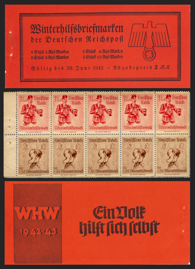 Britische Propagandafälschung für Deutschland: Gefälschte Marken zugunsten des "Winterhilfswerks": Soldat mit eingeschlagenem Gesicht, Göring bzw. Himmler sammelt für die Winterhilfe. Markenheftchen Außenseite, Innenseite sowie Markenblock.